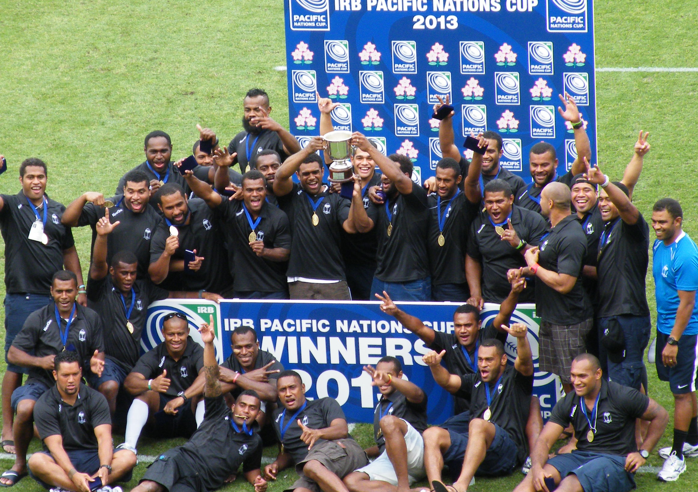 IRBパシフィック・ネイションズ・カップ 表彰式後のフィジー